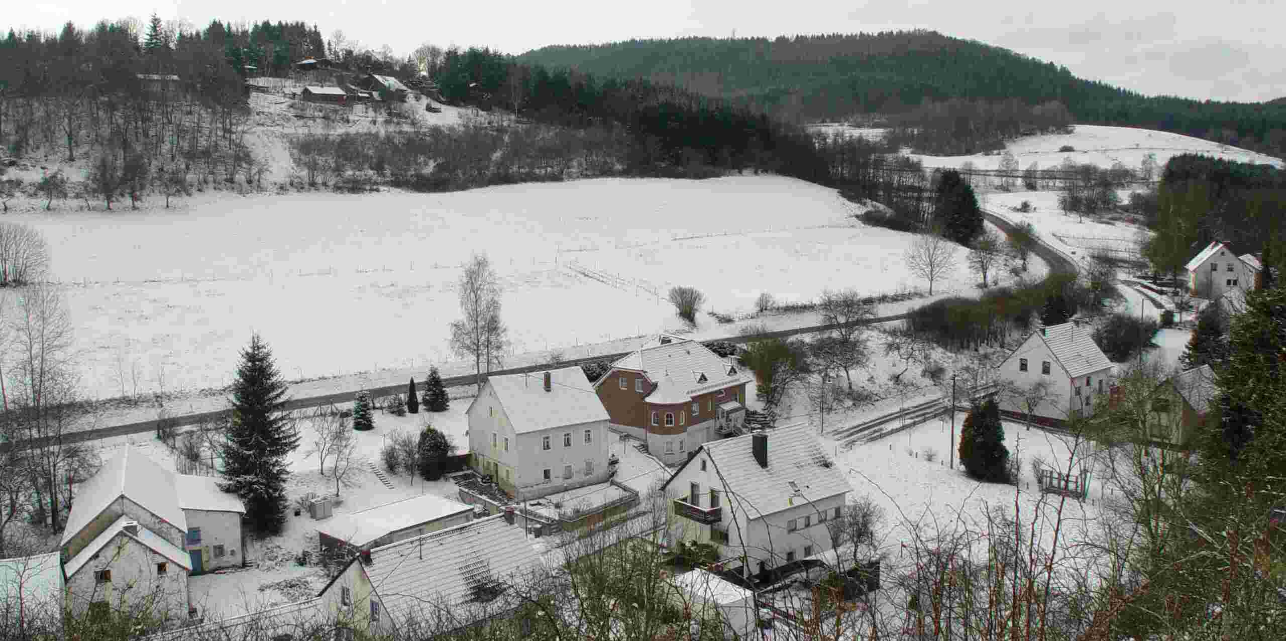 es handelt sich um den westlichen Ortsteil von Schutz